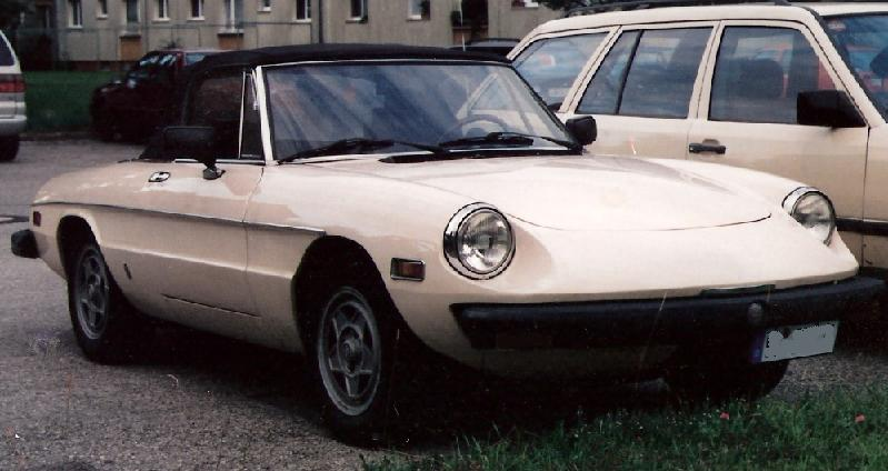 In Deutschland zugelassener Alfa Romeo Spider Fastback 2000 injection, Baujahr 1981 (Ausführung für die U.S.A.)